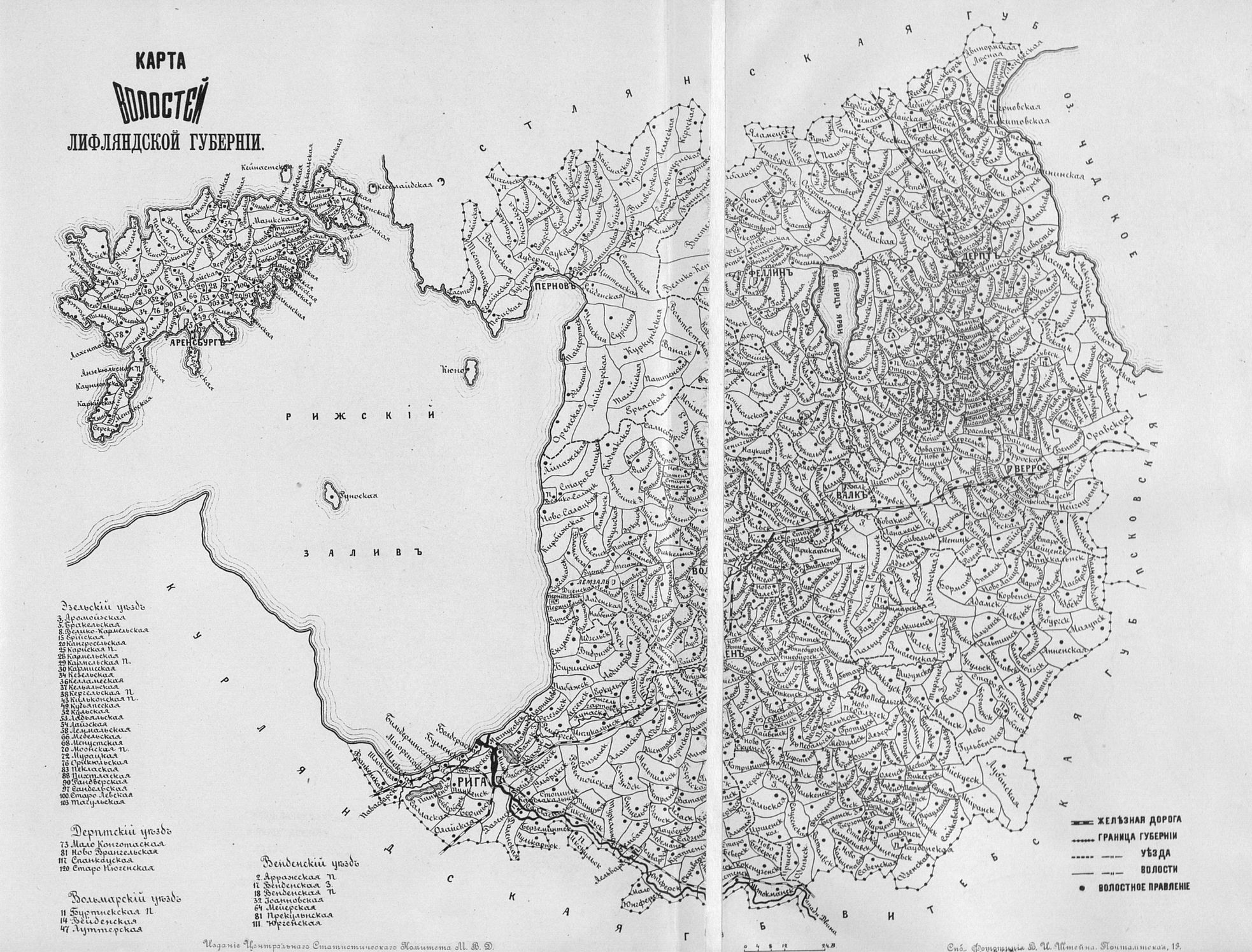 Карта волостей Лифляндской губернии